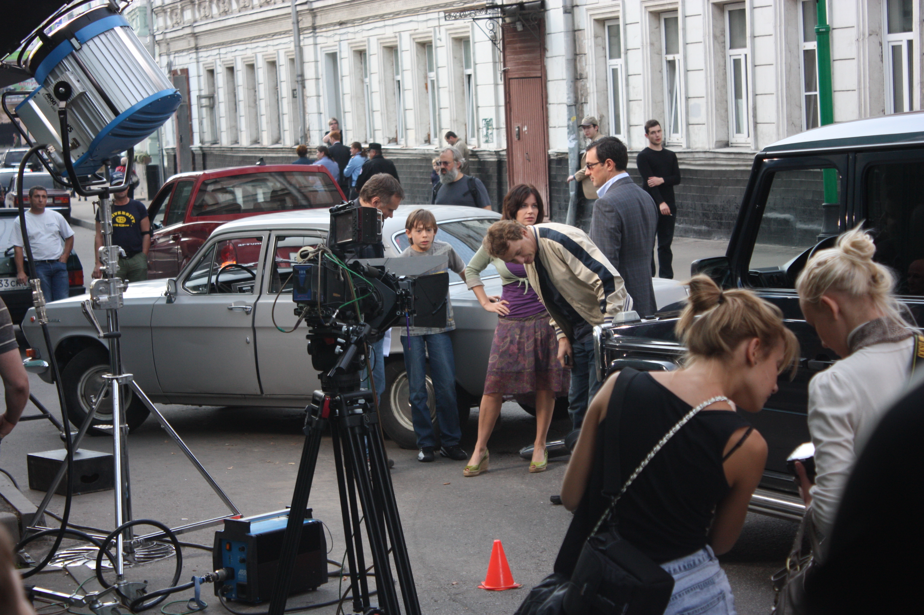 Съёмки фильма "Индус" в Подколокольном переулке. Достопримечательное место "Хитровка". Сентябрь 2009 года